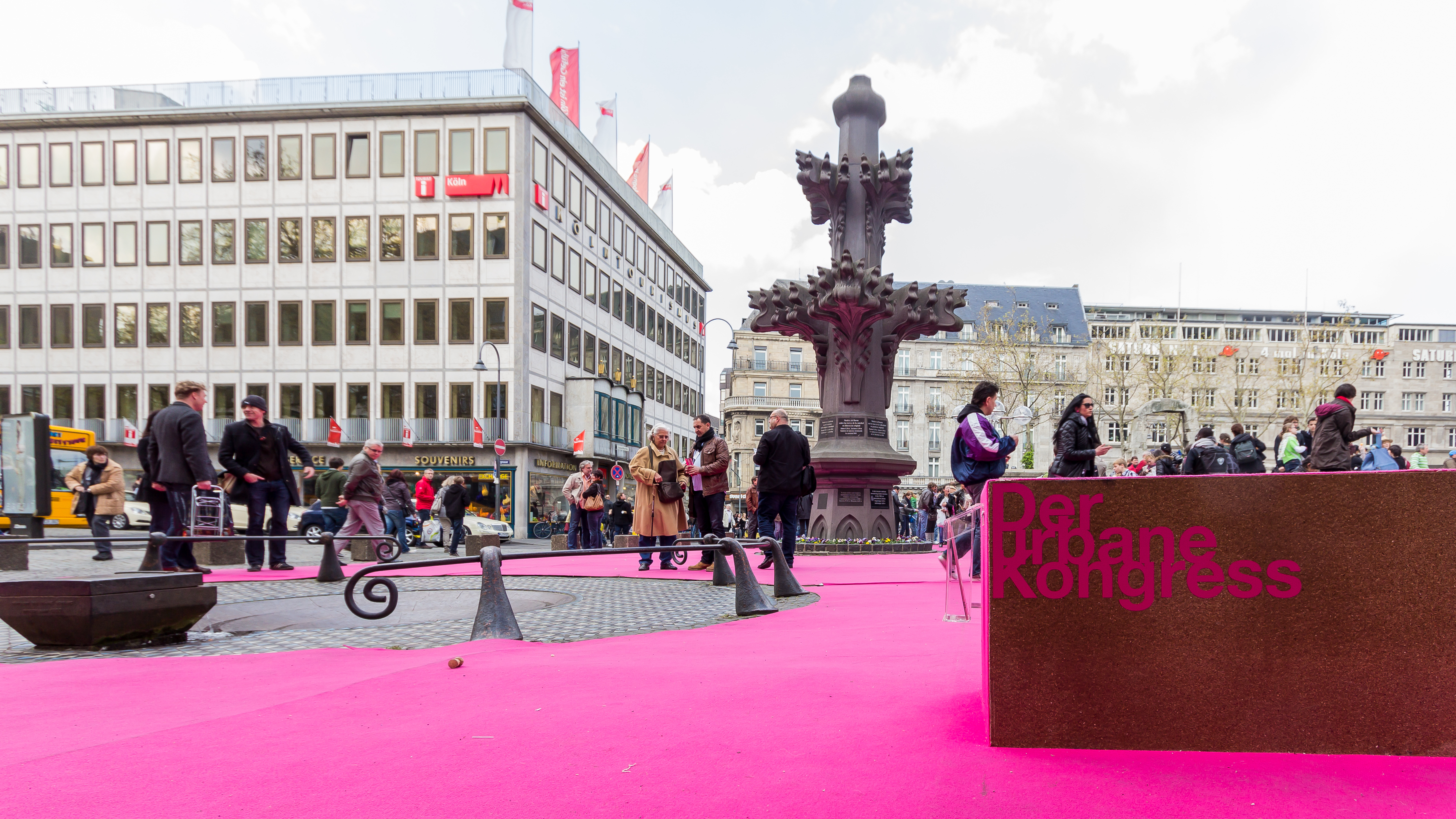 Der urbane Kongress - Taubenbrunnen und Kreuzblumenreplik. Der Kardinal-Höffner-Platz Köln wurde für den urbanen Kongress mit einem pinken Teppich ausgelegt